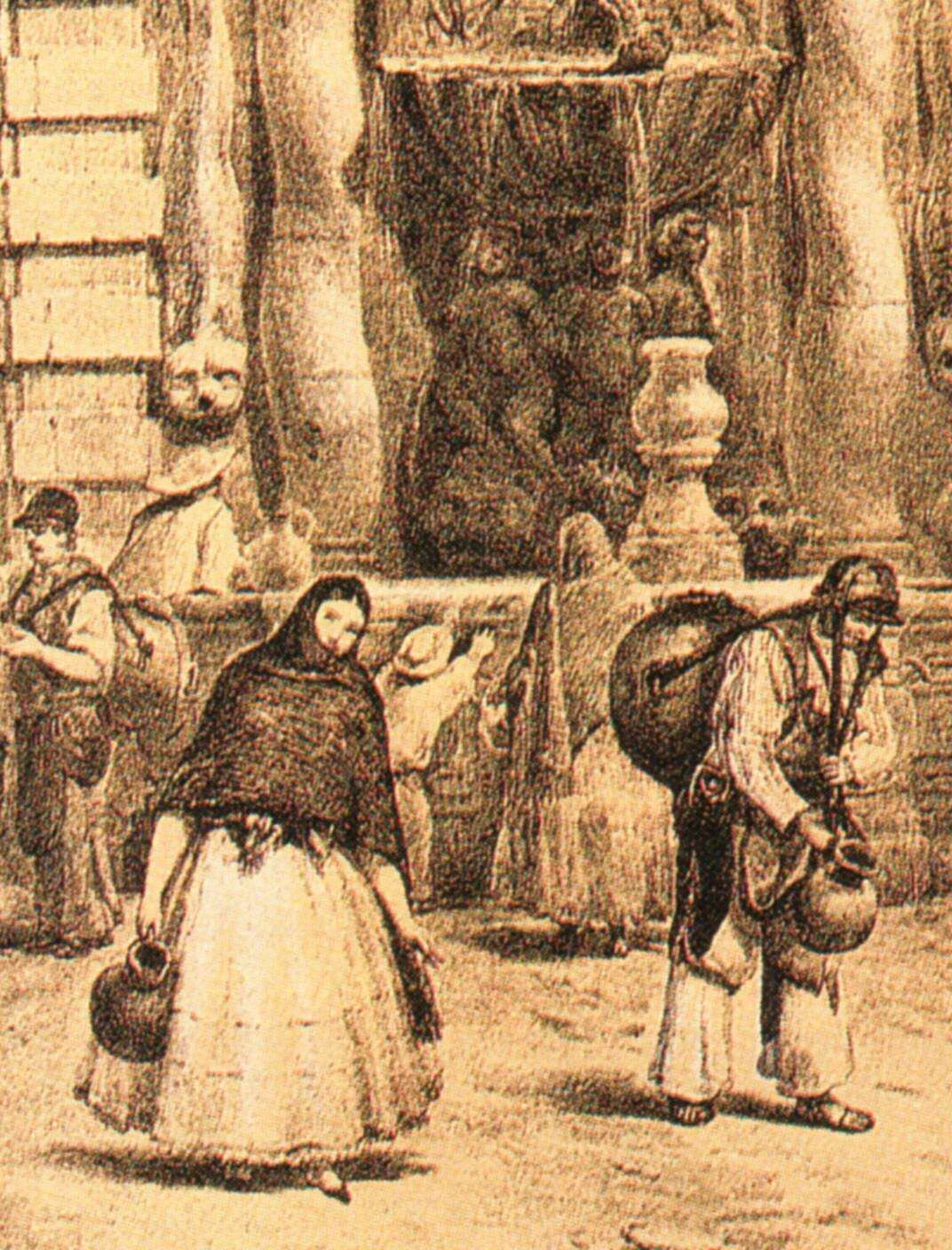 Detalle de la litografía Fuente el Salto del Agua — de Casimiro Castro. Litografía de el Fuente el Salto del Agua, en México, D. F.